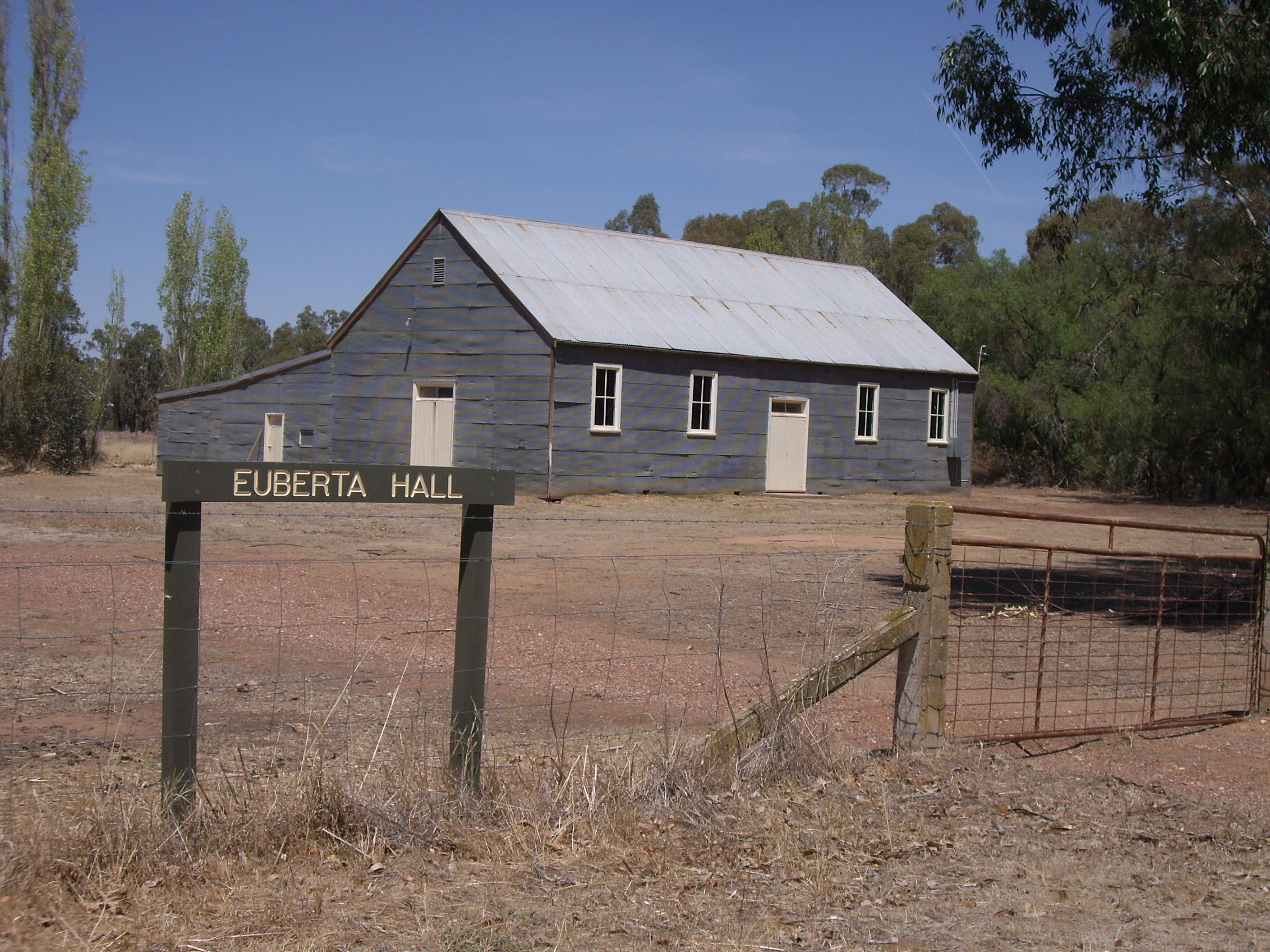 Euberta Hall